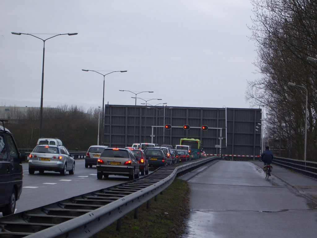 De Kruithuisbrug in Delft in geopende toestand. Eigen foto, maart 2006.